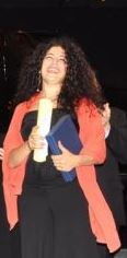 Fotografía de la pianista greco-venezolana Alexia Mouza durante la entrega del Primer Premio en la XXXIV edición del Concurso Internacional de Piano Delia Steinberg celebrado en Madrid en 2015.